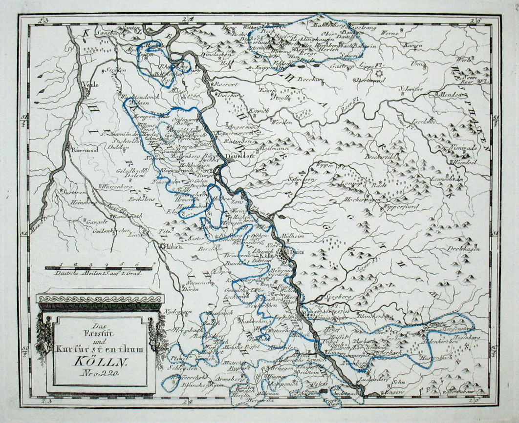 Das Erzstift und Kurfürstenthum Kölln. Nro. 220. Kolorierter Kupferstich